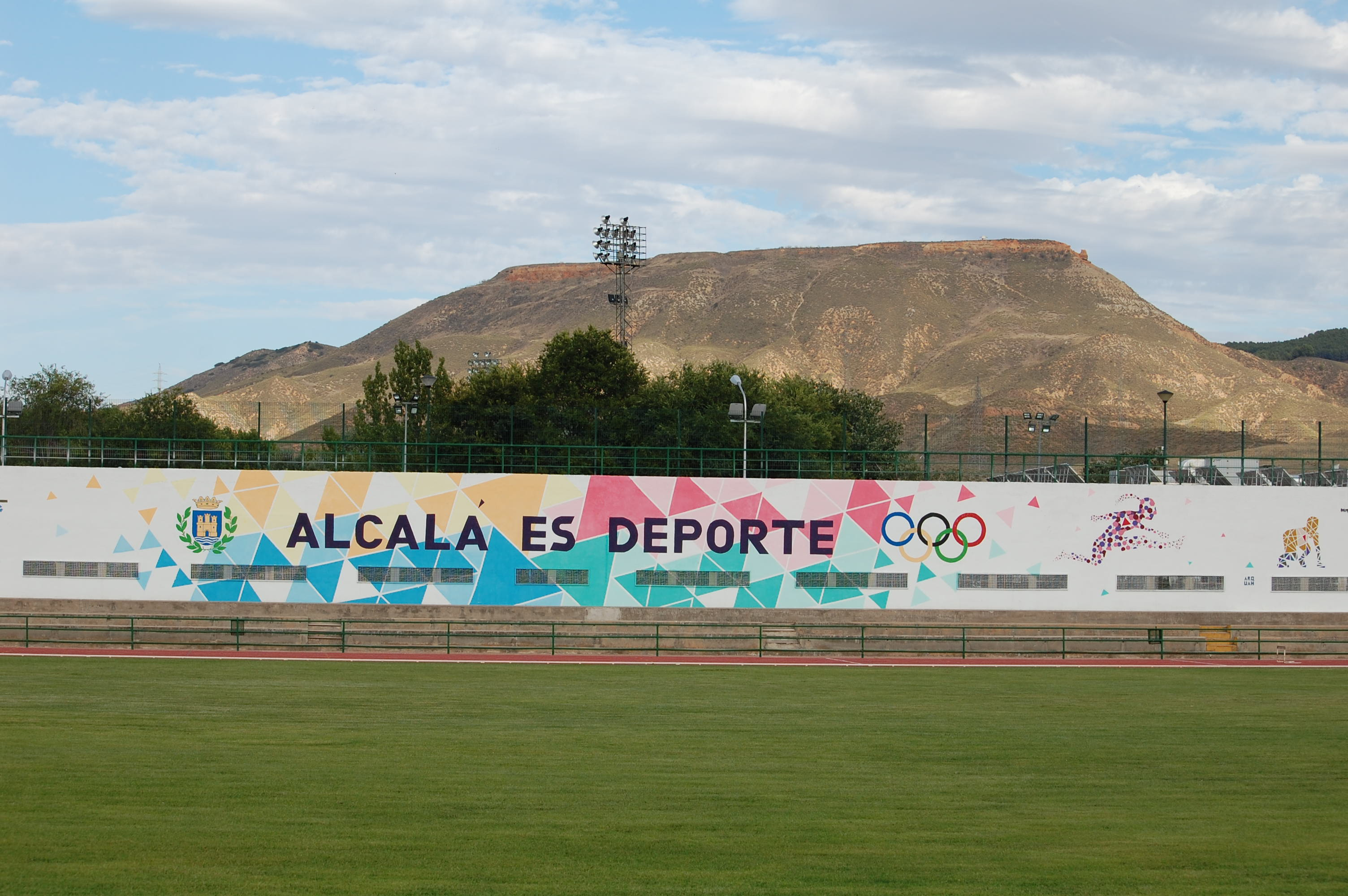 Pista de atletismo de la "Ciudad Deportiva Municipal El Val" de Alcalá de Henares (Comunidad de Madrid - España). Mural con el eslogan "Alcalá es deporte". Al fondo destaca el cerro Ecce Homo.